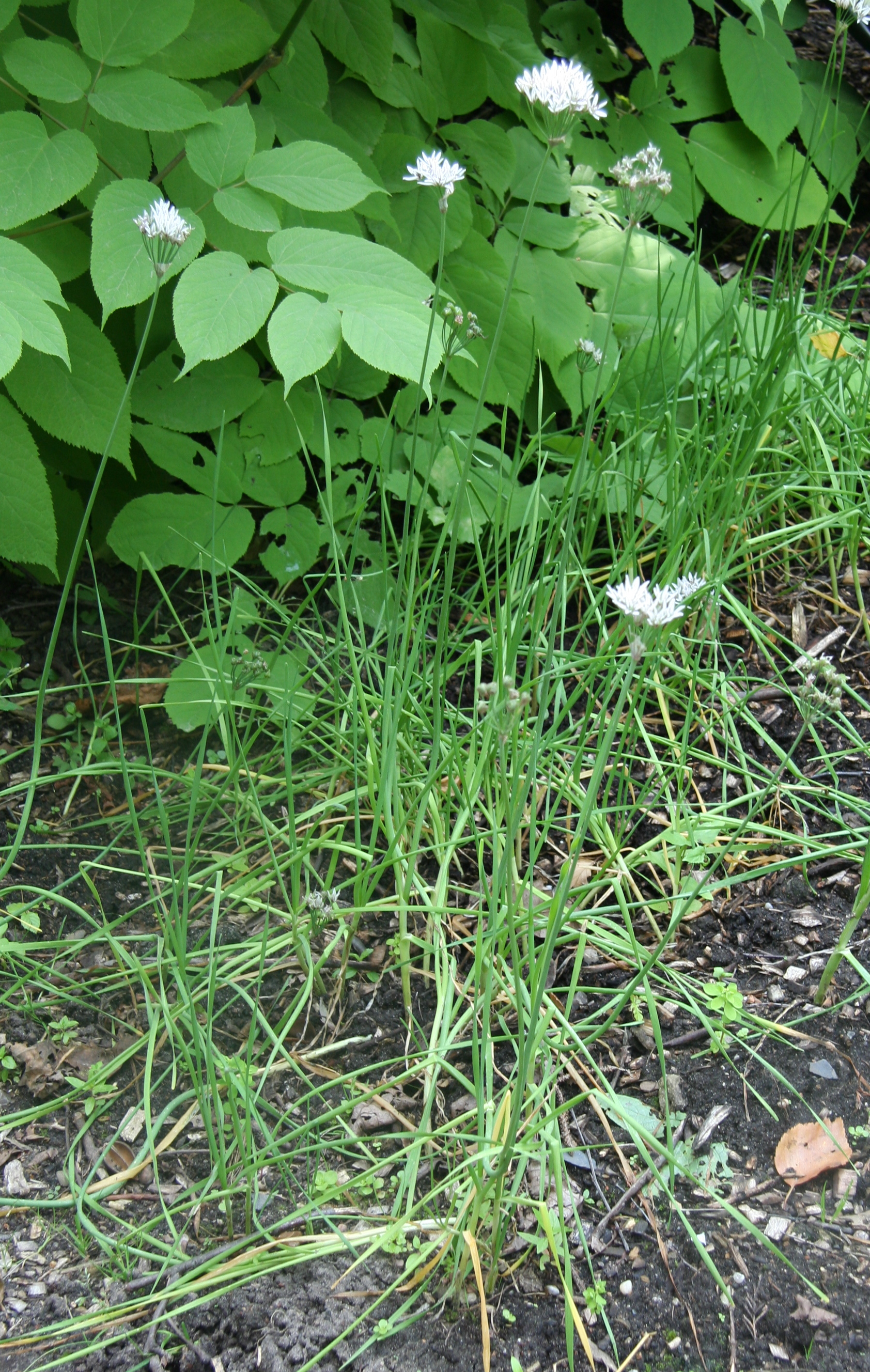 Allium ramosum im Botanischen Garten Hamburg